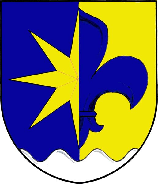 Babice (okres Olomouc) - znak